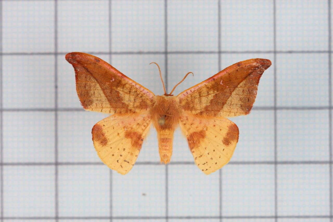 Oreta extensa Walker, 1855 L紋鉤蛾 female 鞍2:P.40,Pl.38-27